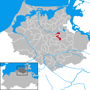 Jakobsdorf in Mecklenburg-Vorpommern - District Nordvorpommern